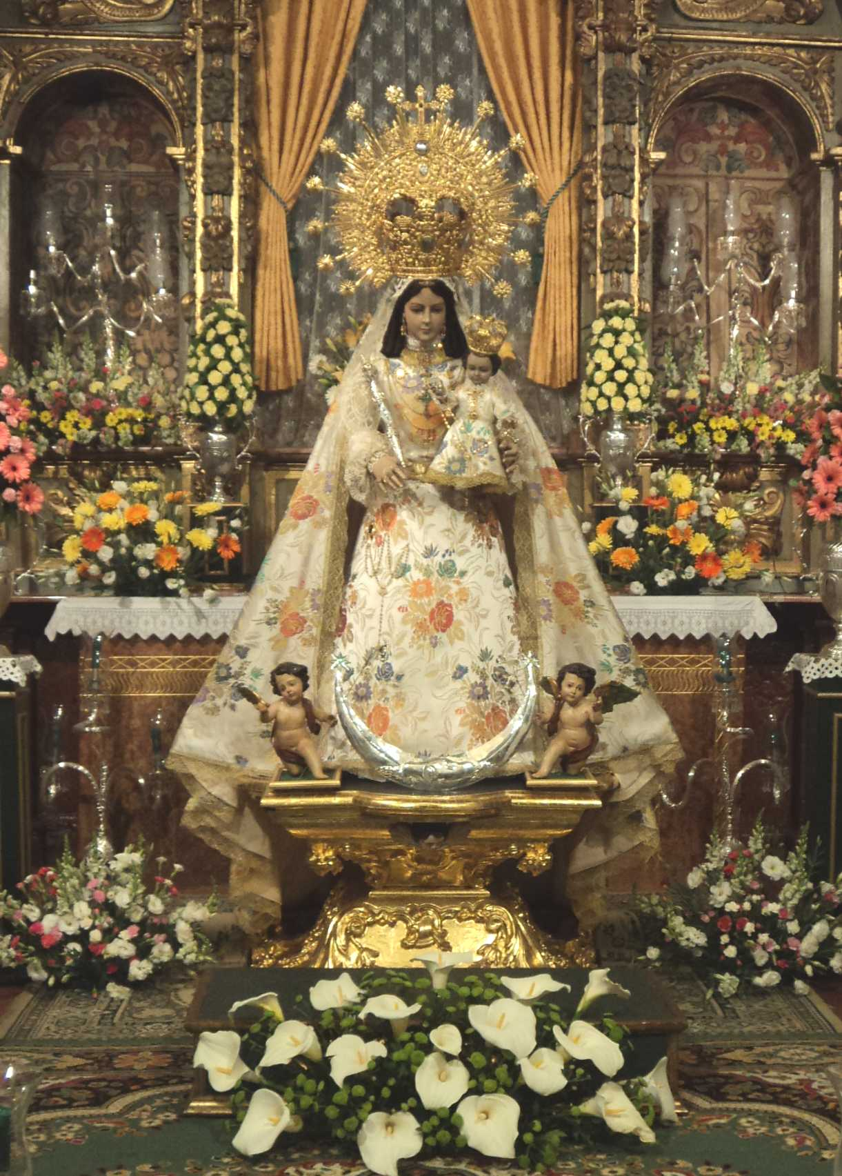 Solemne besamanos celebrado en el mes de mayo